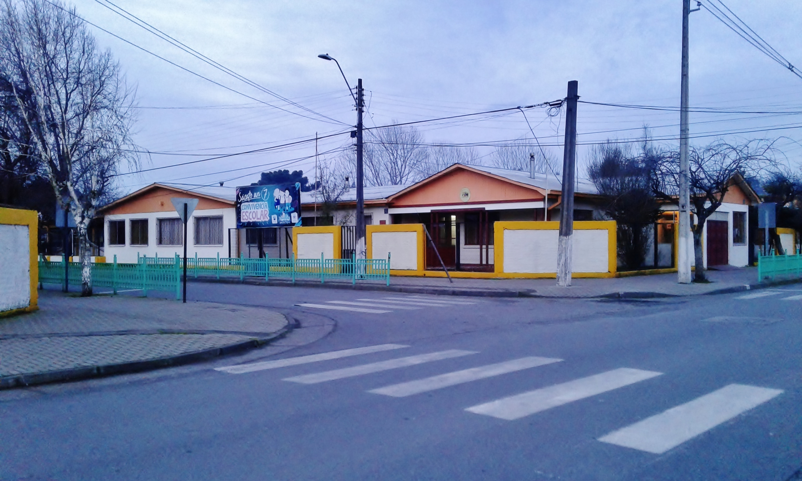 Escuela Orlando Vera Villarroel